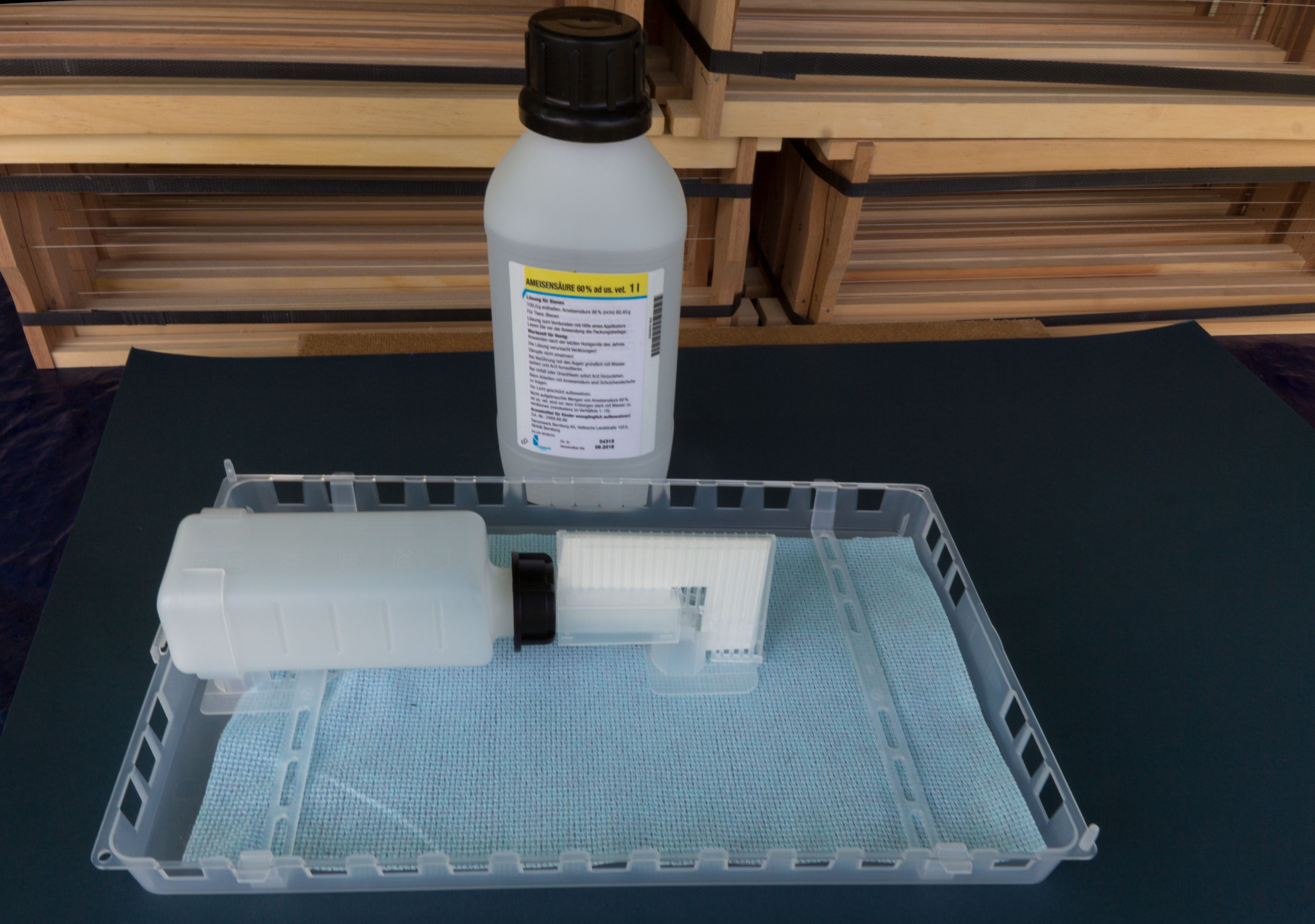 NASSENHEIDER Verdunster professional, Langzeitverdunster zur kontinuierlichen Verdunstung von Ameisensäure 60% ad us. vet. für die Behandlung der Varroose (Varroa destructor) der Honigbiene (Apis mellifera). Bienenarzneimittel.